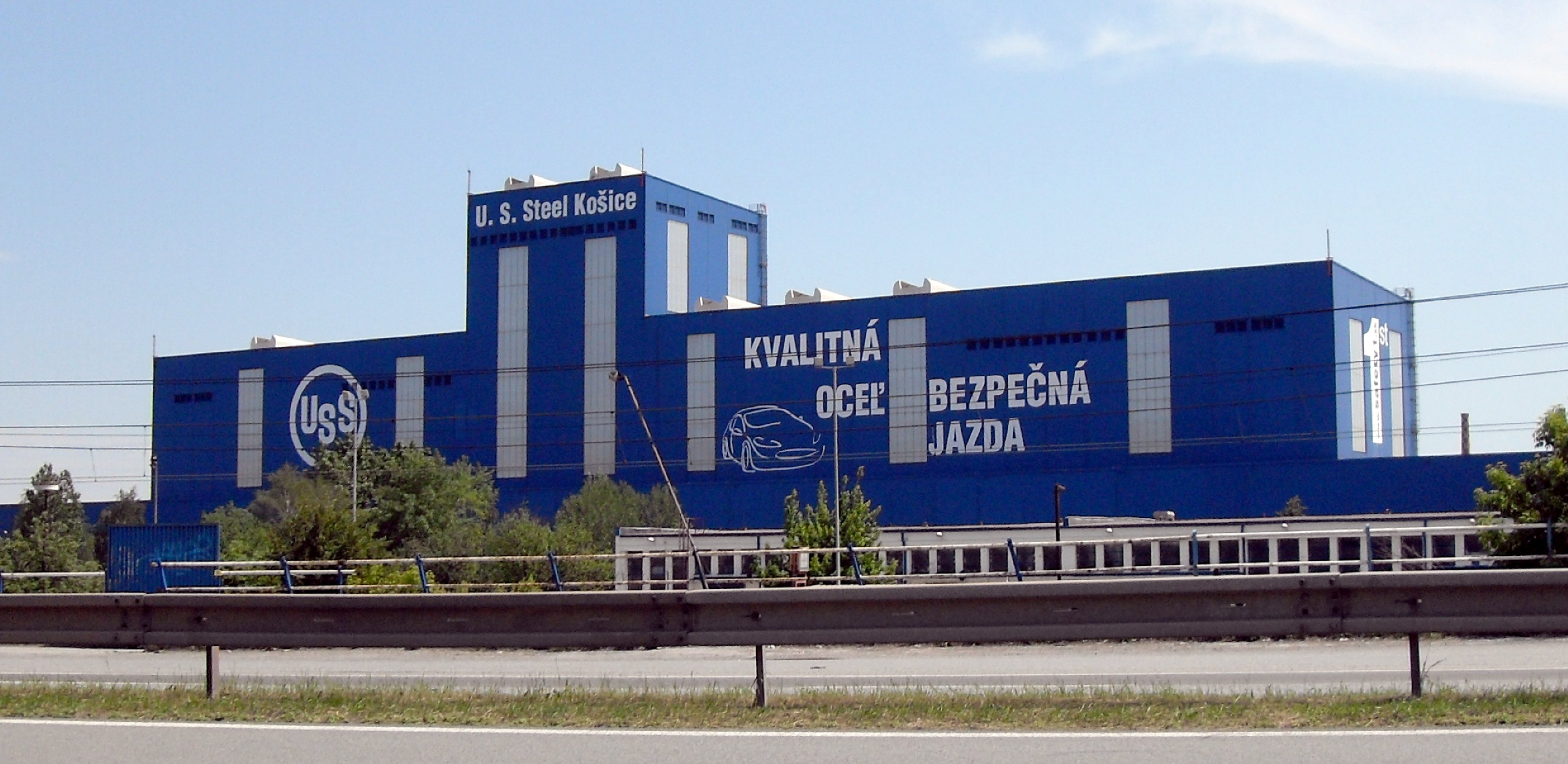 Administratívna budova U. S. Steel Košice